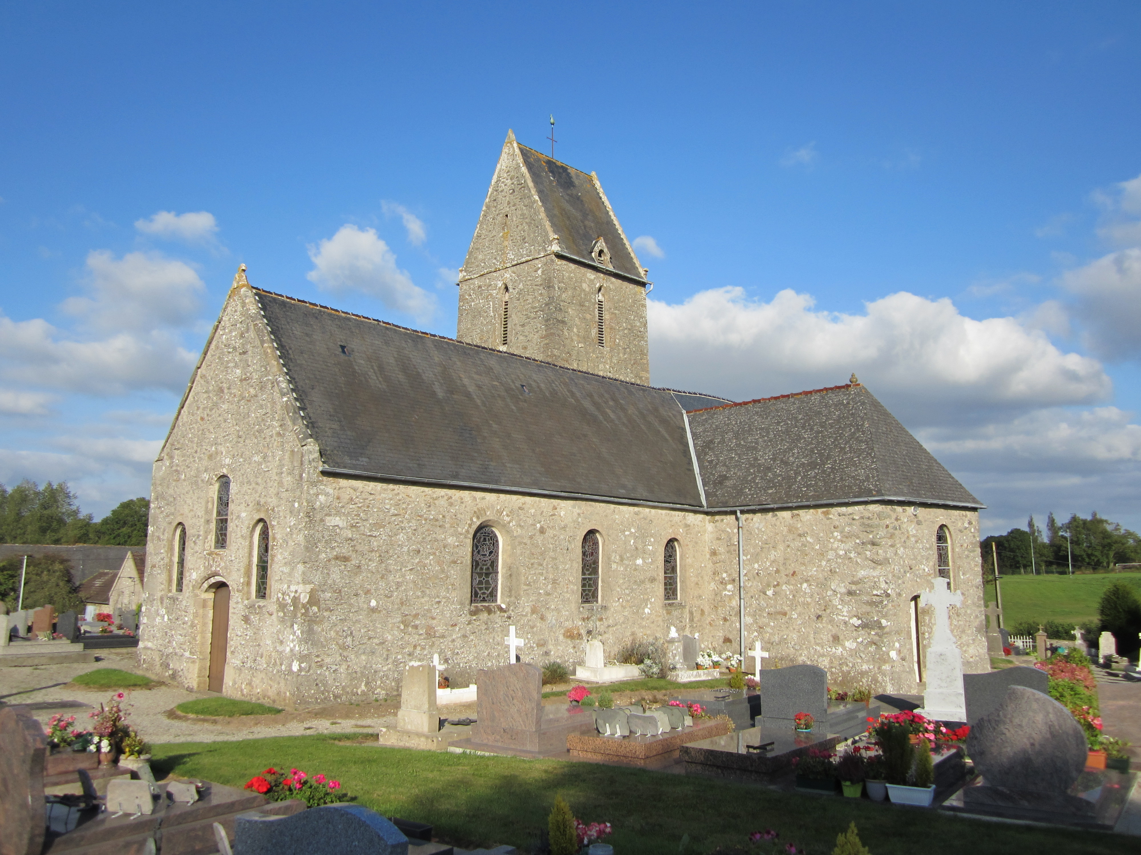 église Notre-Dame du Mesnil-au-Val